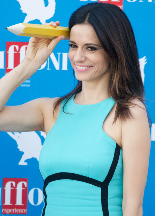 Rossella Brescia al Giffoni Film Festival 2012